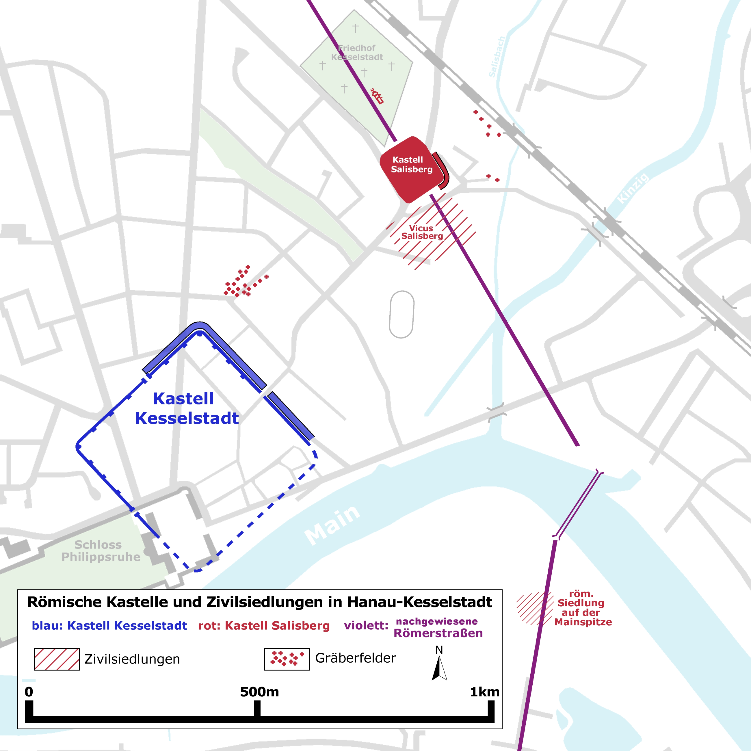 Römische Kastelle und Zivilsiedlungen in Hanau-Kesselstadt, Nach Czysz und Jüngling.